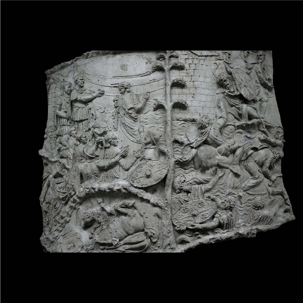 Moulage de la frise de la colonne Trajane, exposé au Museo della Civiltà Romana, Rome.